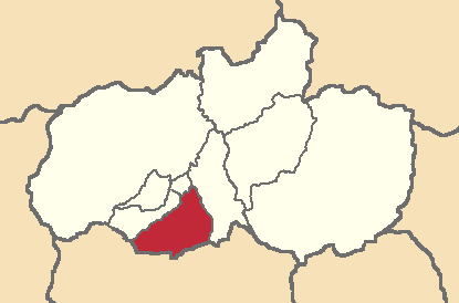 Mapa localizador del cantón en Tungurahua, Ecuador